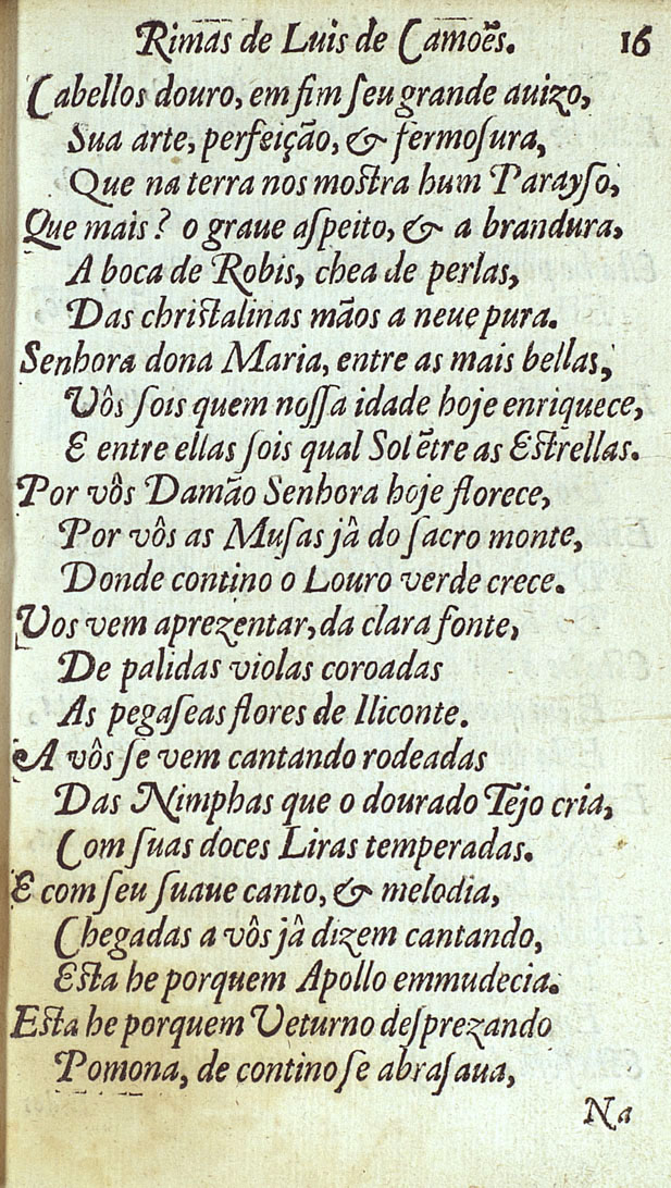 Página com o poema Cabellos douro, das Rimas